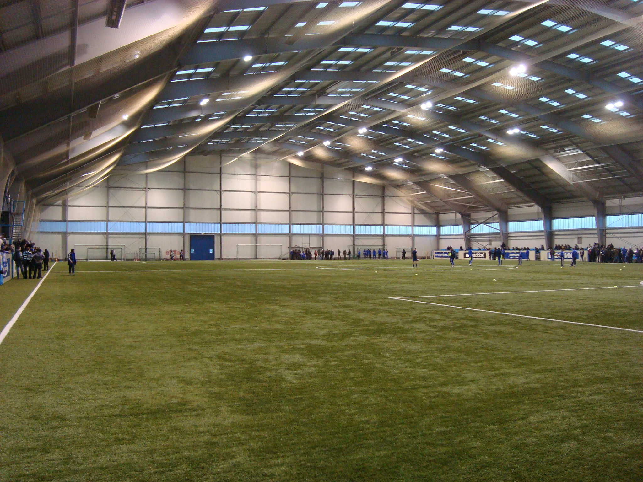 Манеж Навчально-тренувальної бази Динамо у Конча-Заспі